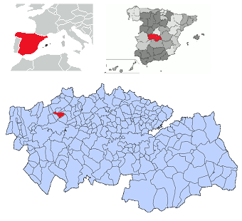 Cervera de los Montes en la provincia de Toledo